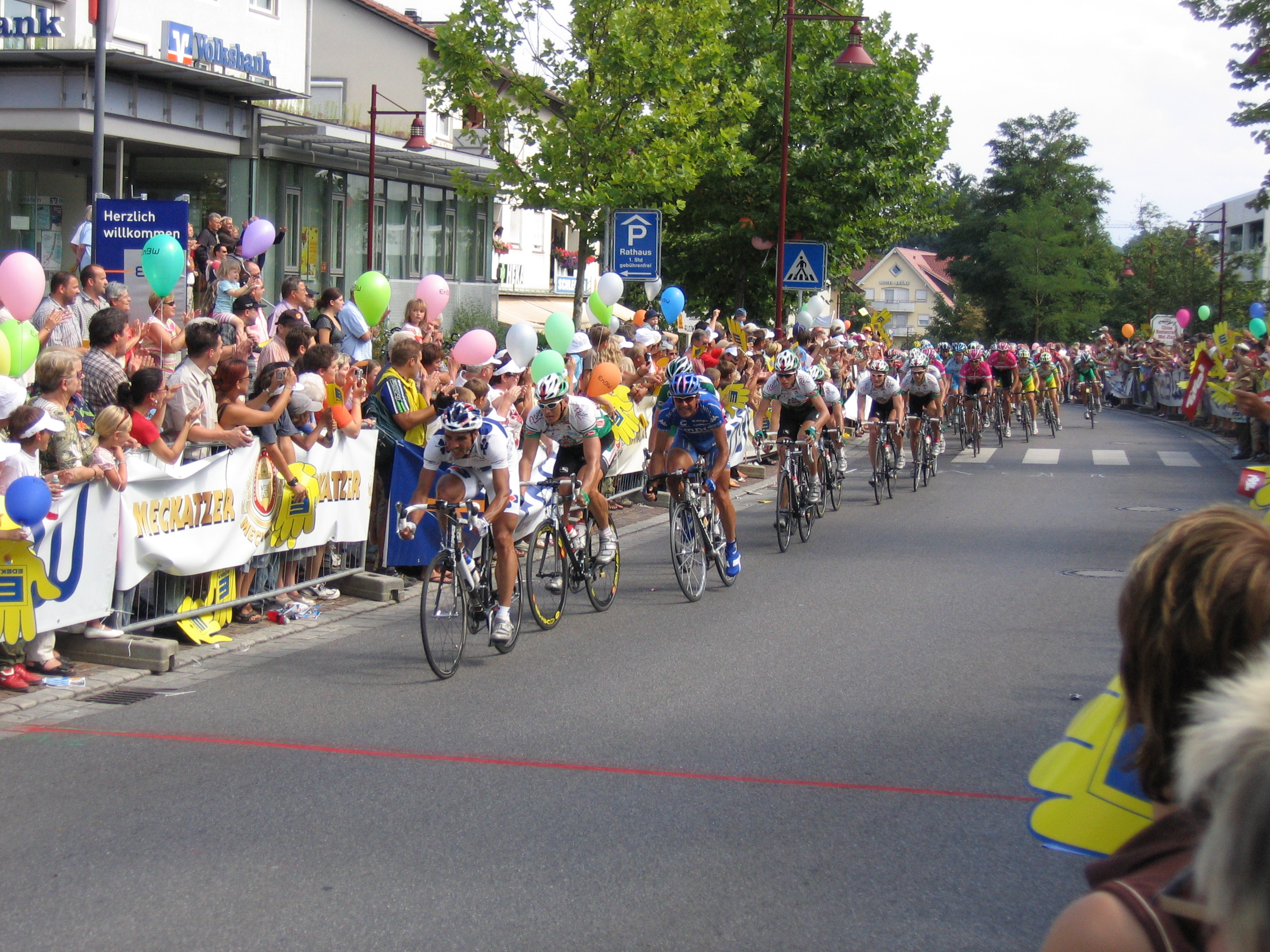 DT2005-Hauptfeld in Kressbronn